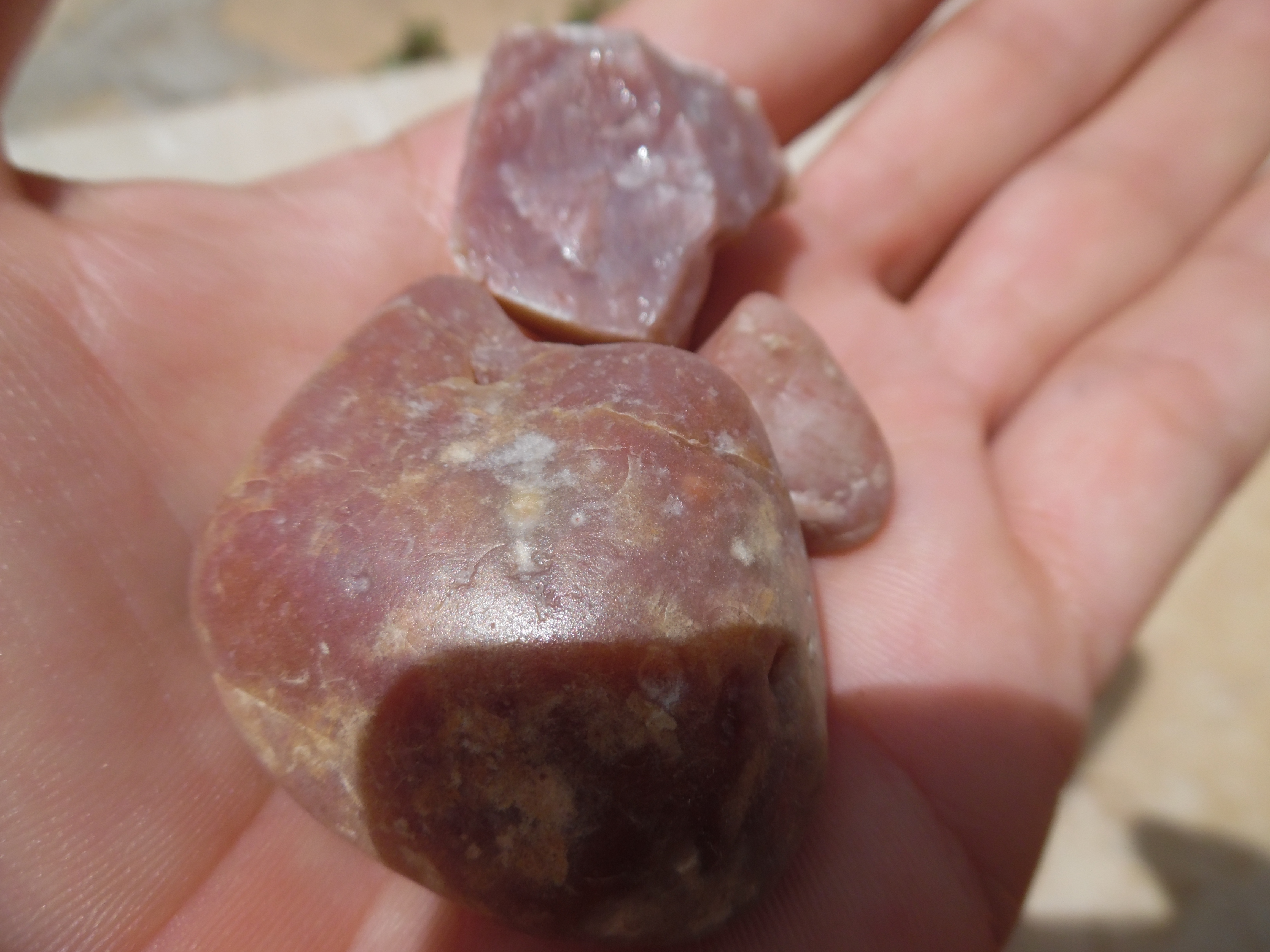 GMF Alcocebre